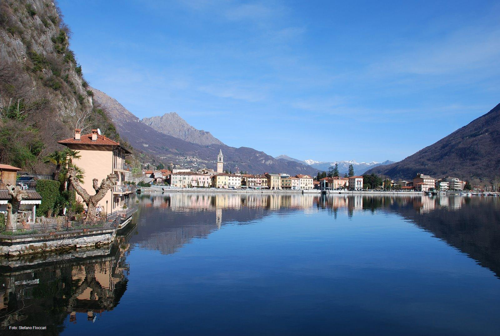 Porlezza vista dalle vecchie gallerie; foto di Stefano Floccari.